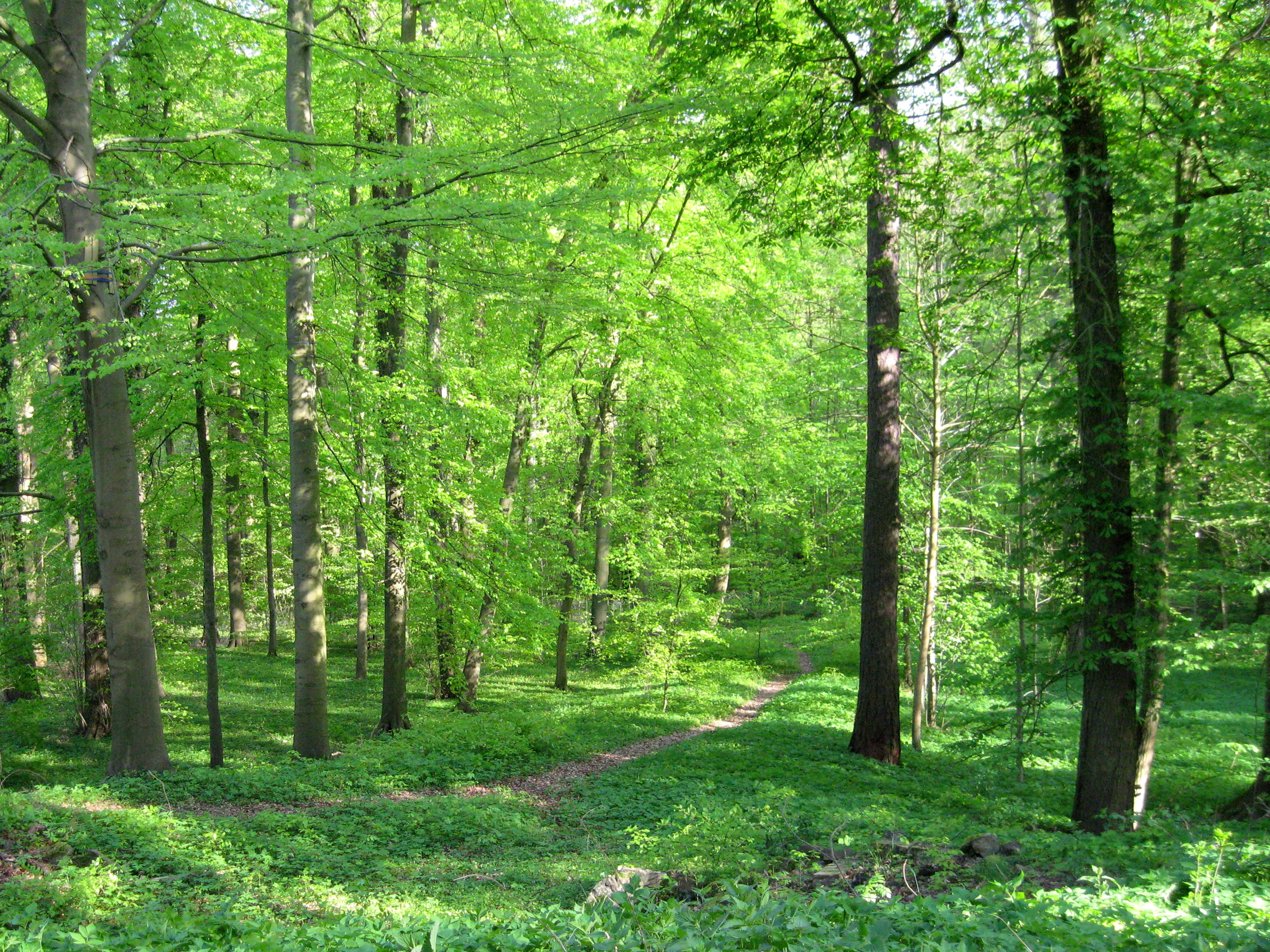 Schlosspark des Ortes Lanke in der Gemeinde Wandlitz, Landkreis Barnim, Land Brandenburg, Deutschland